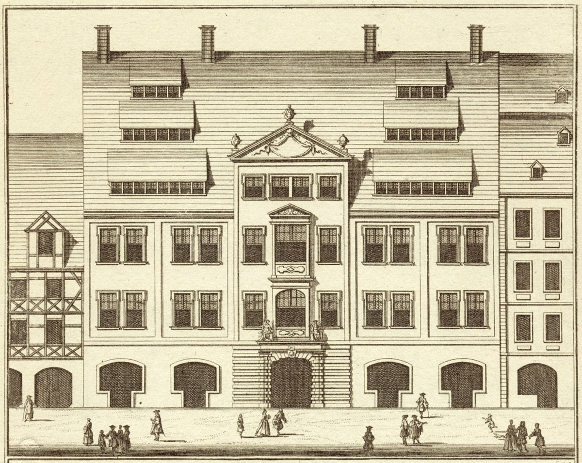 Das Haus Die Feuerkugel, Neumarkt 3 in Leipzig, erbaut von J.E. Kregel von Sternbach 1695